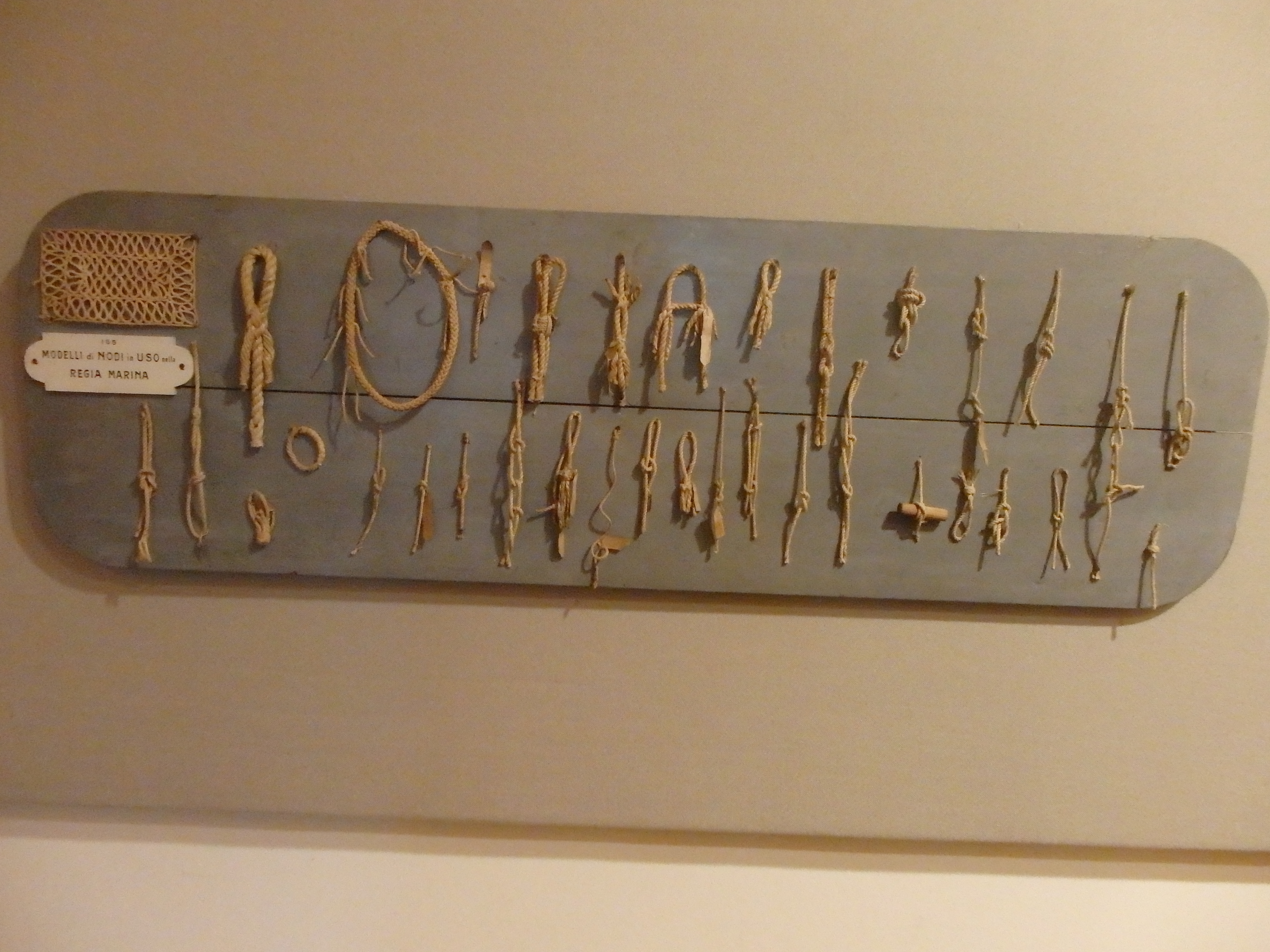 Viste dal Vomero, Napoli.